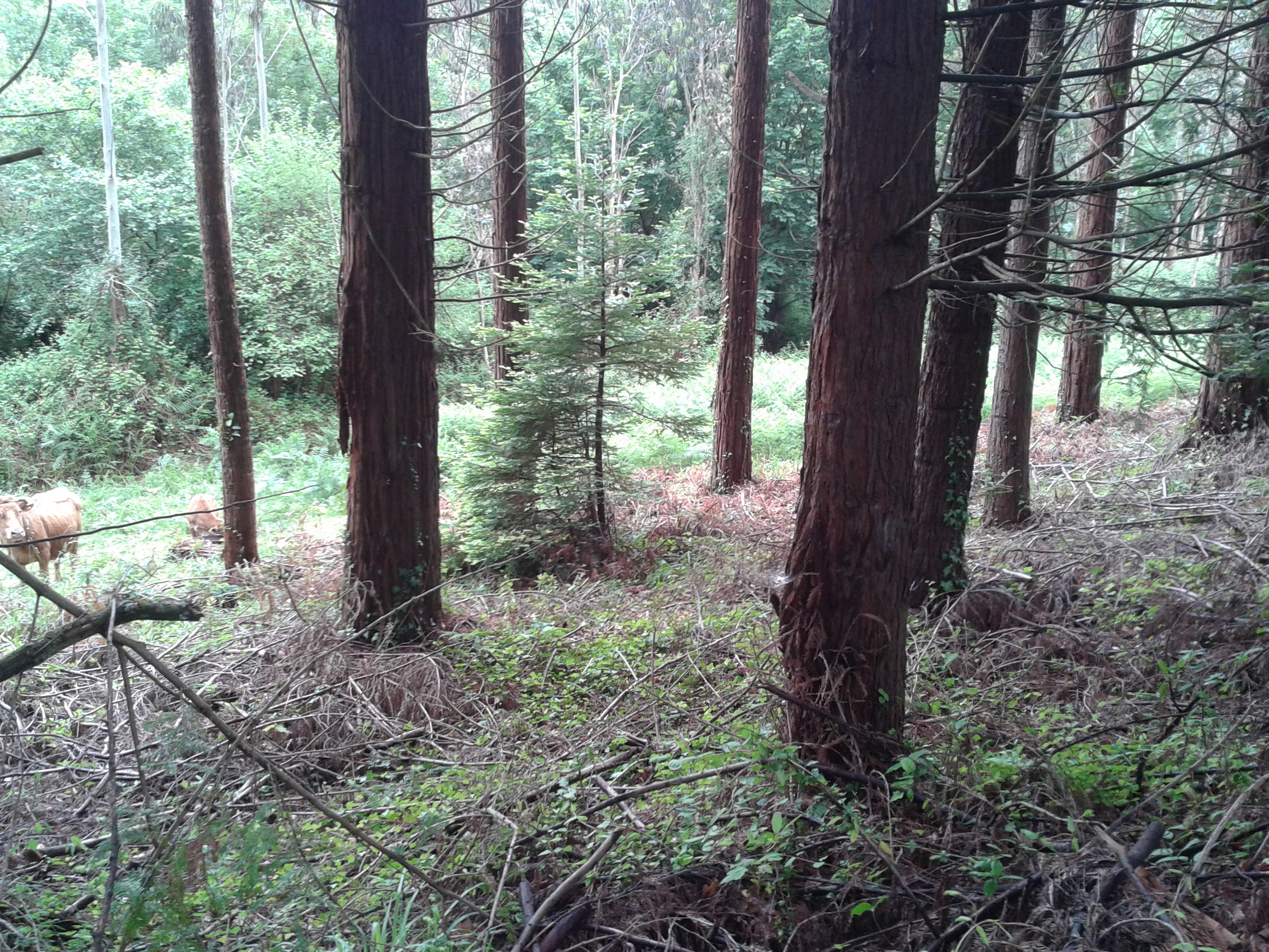 Sequoia nova entre sequoias na plantación experimental de Fontao, Foz. Bosque de ribeira do río Ouro ao fondo. Vaca e cuxo do país á esquerda serven de referencia.